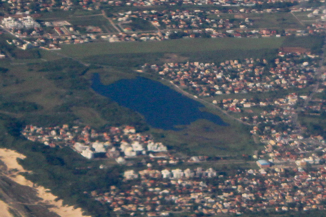 Foto aérea da Lagoa Pequena, em Florianópolis.